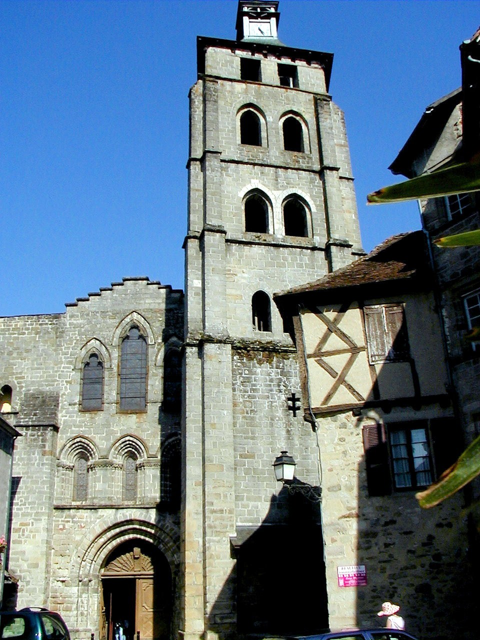 Beaulieu-sur-Dordogne - Abbatiale Saint-Pierre - Façade et tour ouest